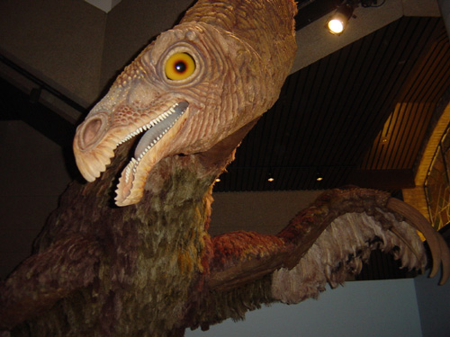 Therizinosaurus model, Royal Ontario Museum.